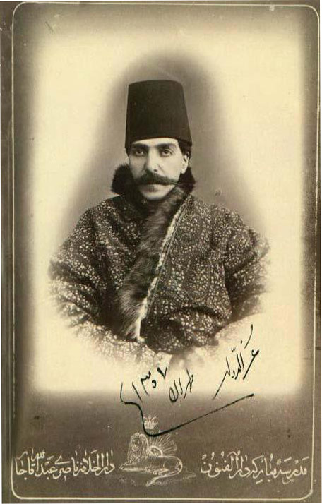 Abdol-Samad Mirza Ezz ed-Dowleh Saloor